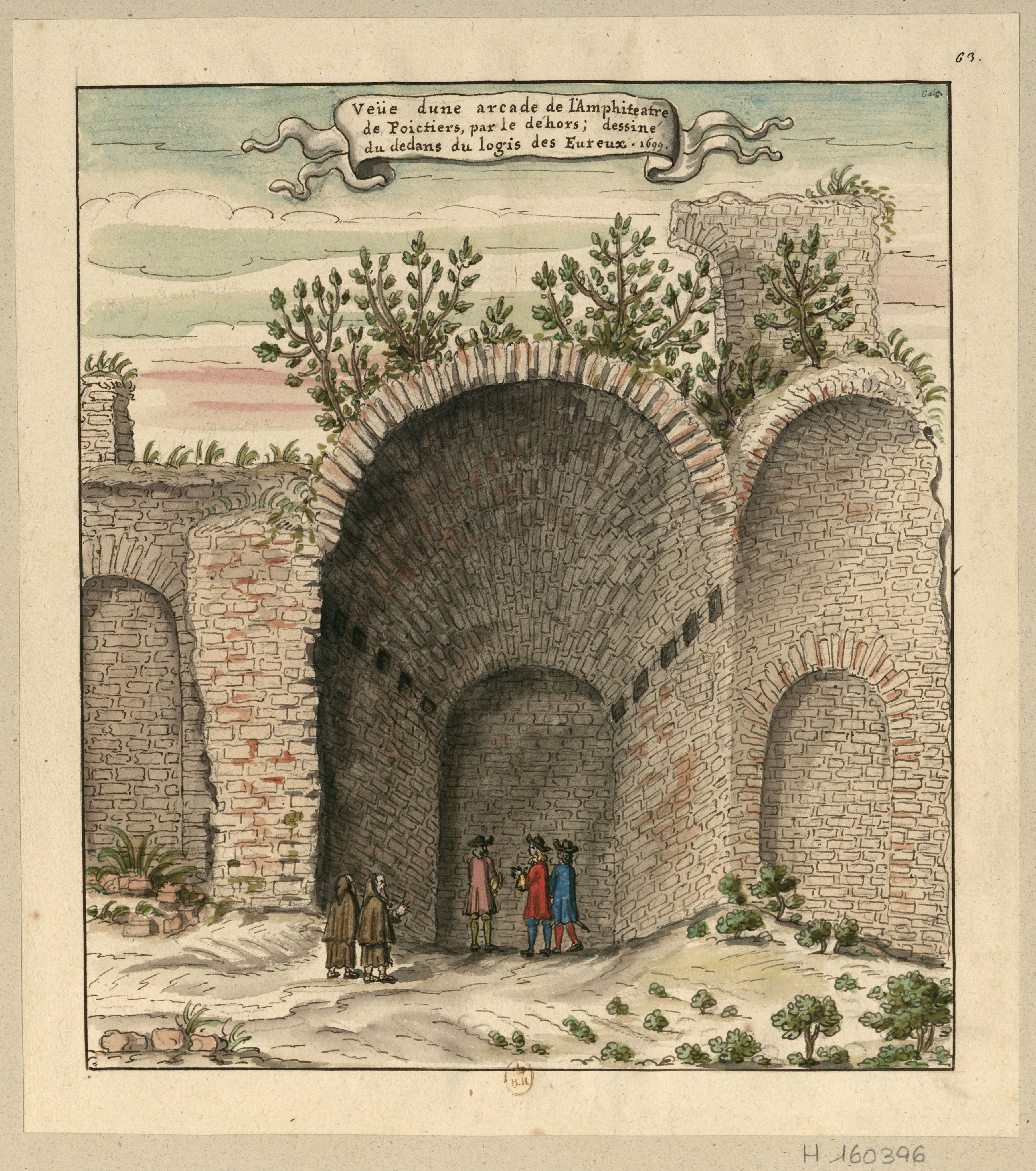 « Veüe d'une arcade de l'Amphitéatre de Poictiers, par le dehors; dessiné du dedans du logis des Eureux ». Aquarelle ; 33,2 x 29,7 cm (f.), 29,4 x 25,9 cm (tr. c.). 1699.